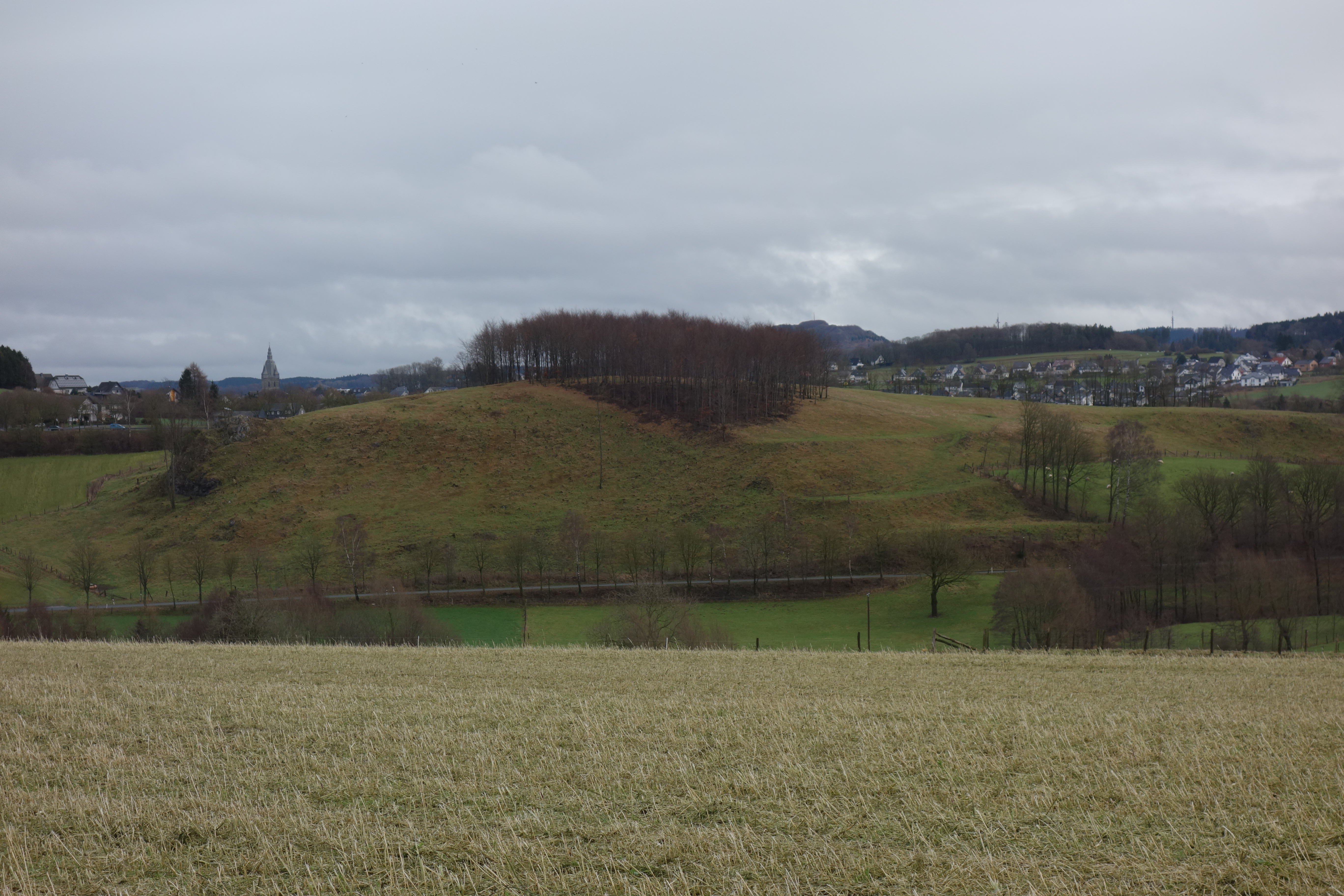 Naturschutzgebiet Hexenstein aus Richtung Westen in Bildmitte. Dahinter ist Brilon zu sehen.